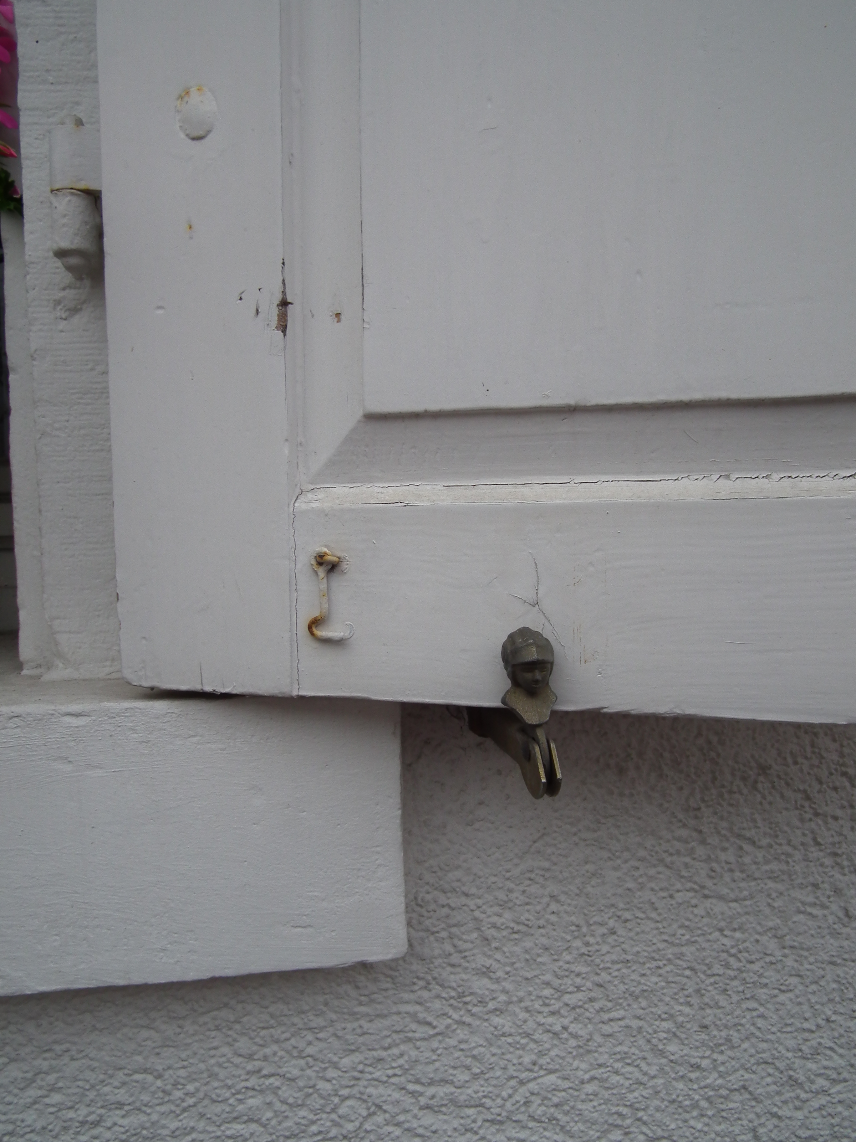 Vorrichtung, um einen geöffneten Fensterladen zu arretieren, in Form eines Kopfes, ein sogenannter "Ladenrückhalter", fotografiert in Baden-Württemberg (Deutschland)